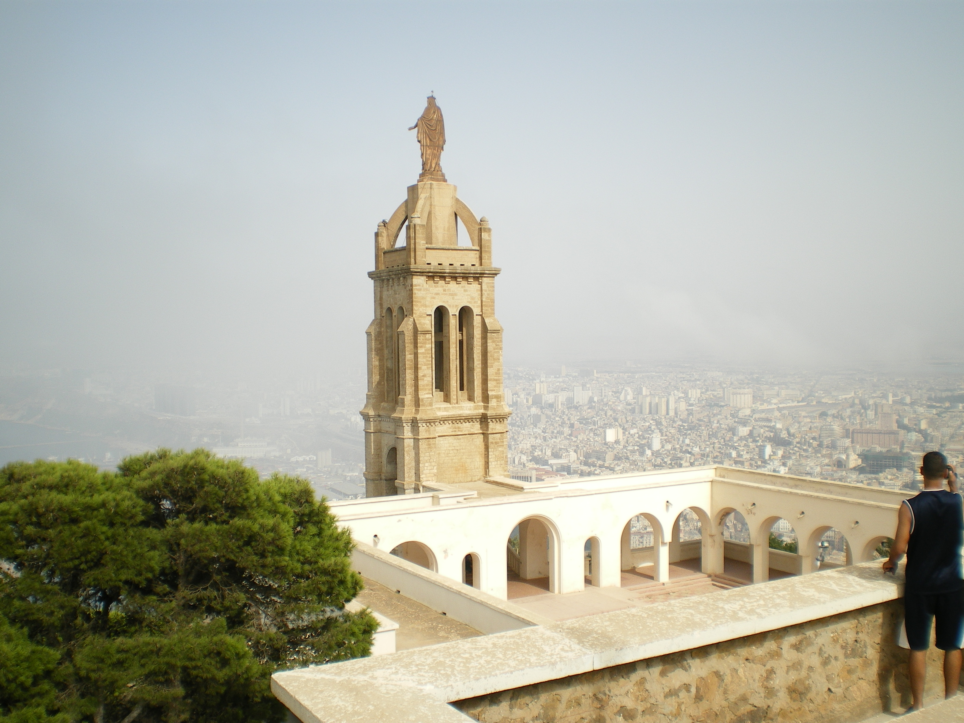 Chapelle Santa Cruz Oran